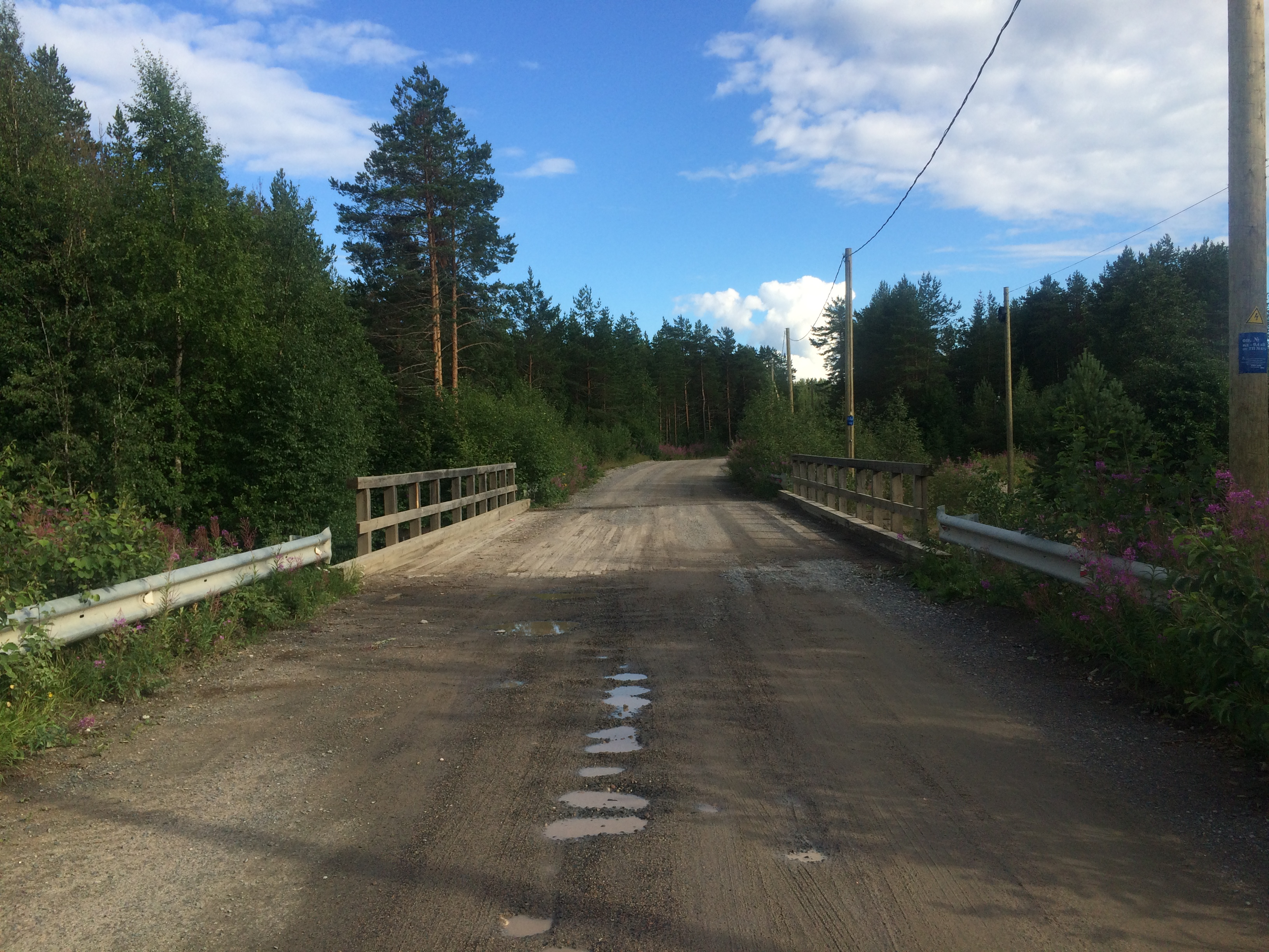 Кудама (река)